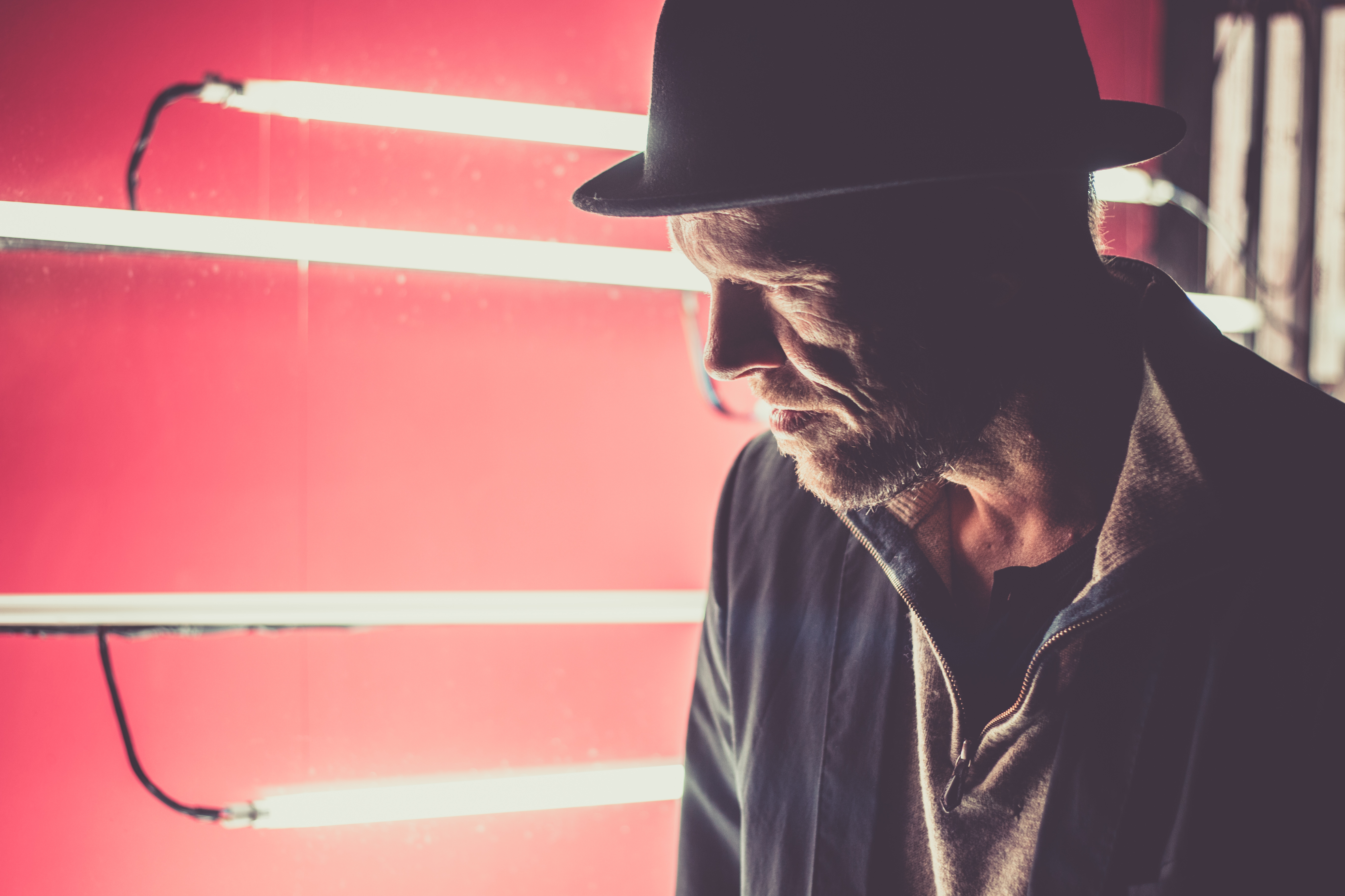 Autor Thomas Podhostnik 2017